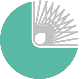 Logo da Biblioteca Virtual da FAPESP